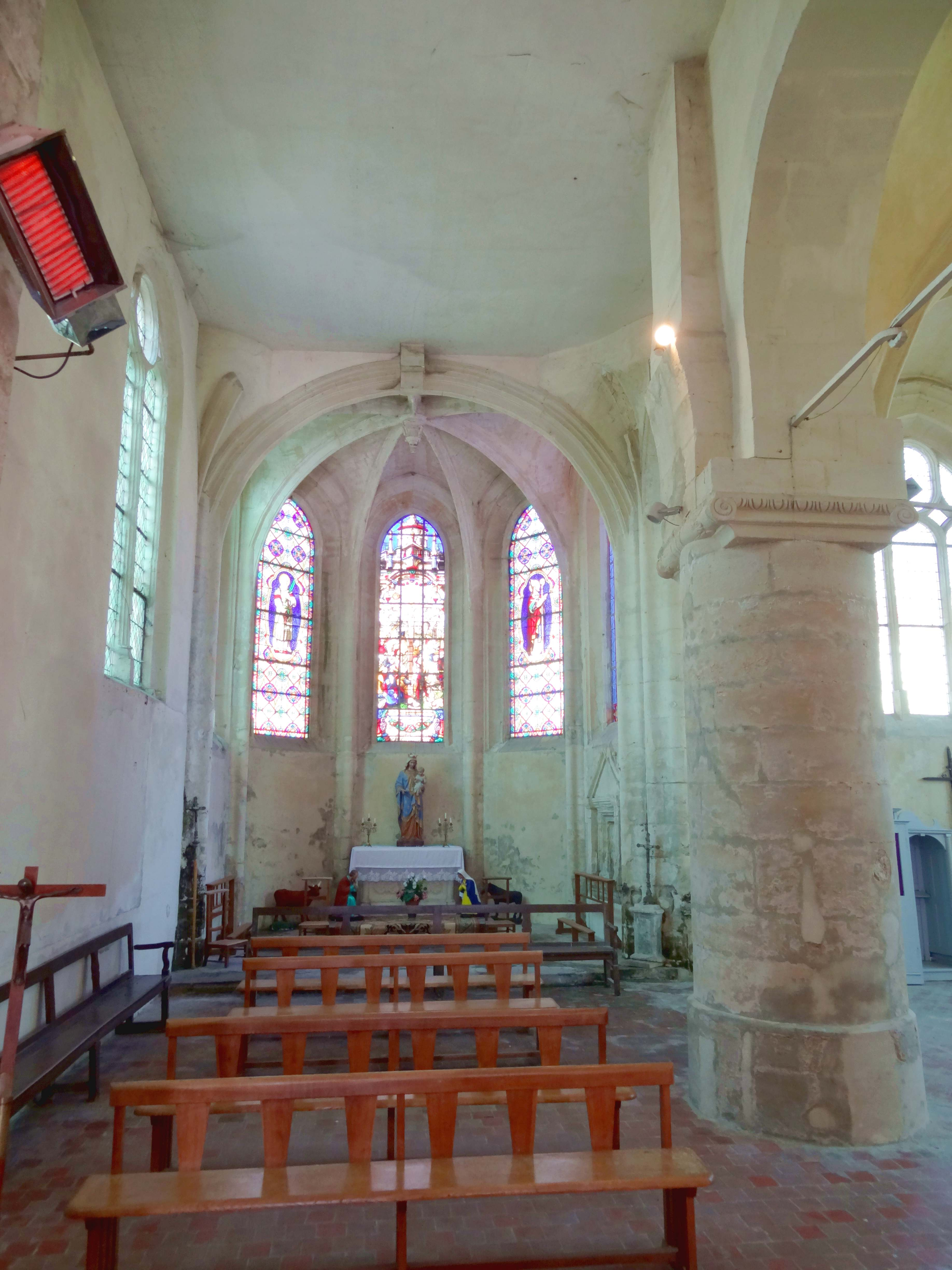 Intérieur de l'église - voir titre.